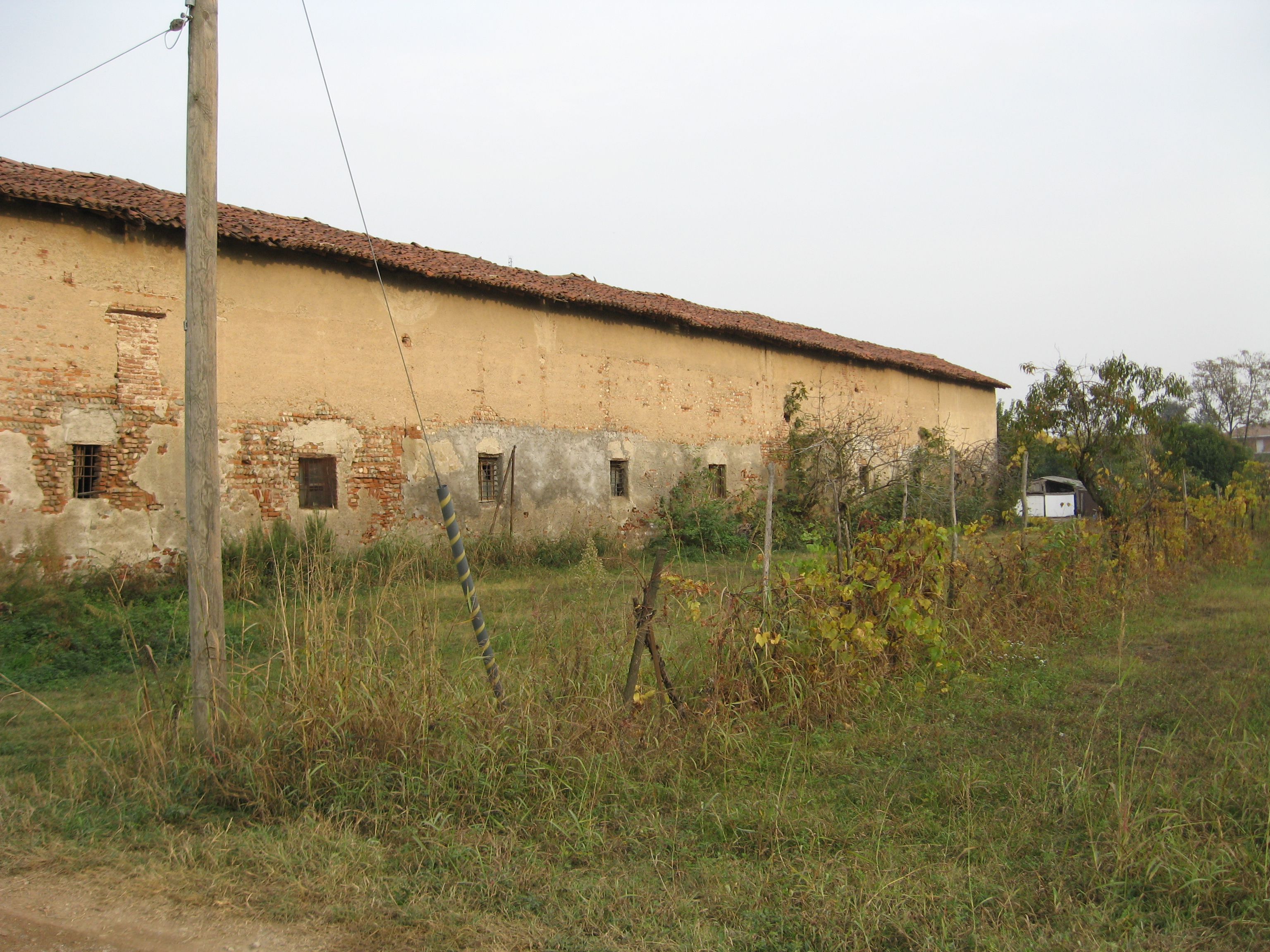 Cascina Ravelino con vigneto This is a photo of a monument which is part of cultural heritage of Italy.